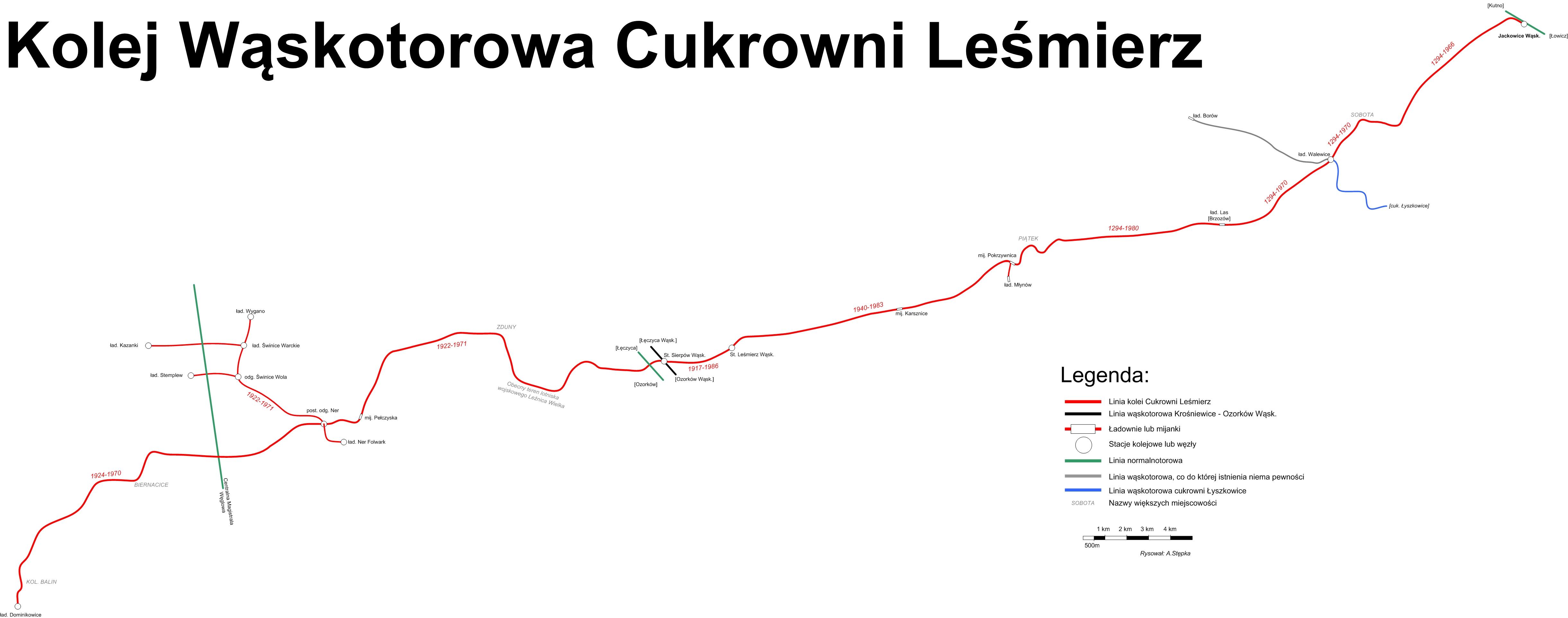 Kolej Wąskotorowa Cukrowni Lesmierz